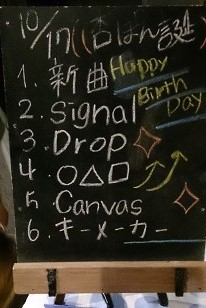 amiinaセトリボード(20151017(1))